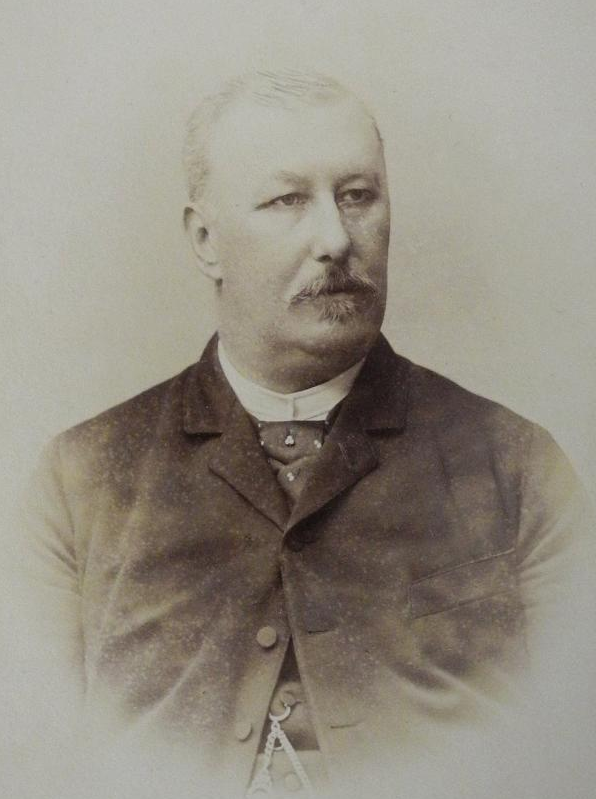 Robert Freiherr von Buddenbrock (Baron Robert von Buddenbrock; geboren am 6. März 1845; verstorben am 24.Februar 1918), Vizepräsident der Österreichischen Waffenfabriksgesellschaft (ÖWG), königlich preußischer Oberleutnant